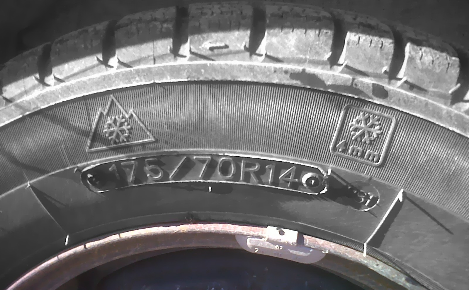 Pneumatico con simbolo del Nord America per gli pneumatici invernali, seguito dalla dicitura dello spessore minimo che deve avere il battistrada (4 mm) per essere considerato invernale.